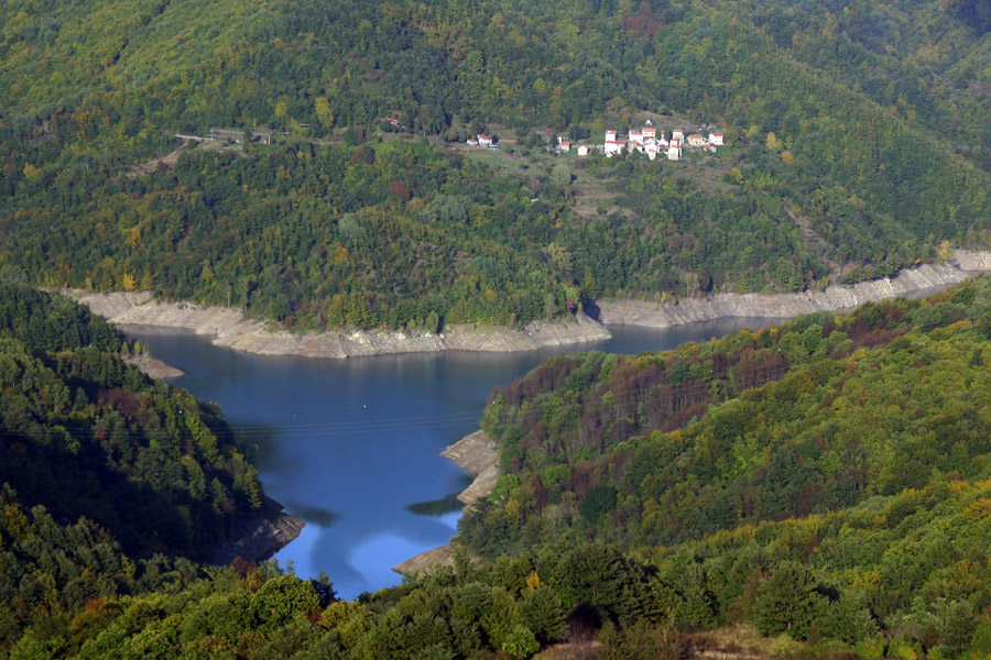 Veduta dall'alto del Lago del Brugneto in provincia di Genova